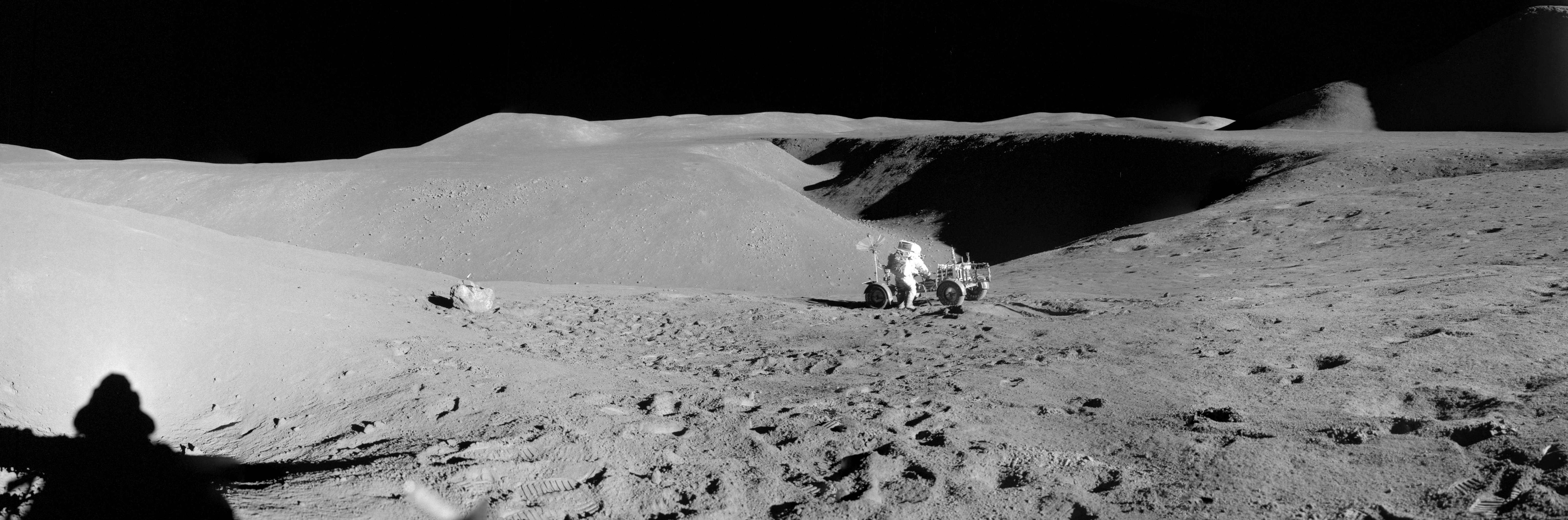 Rima Hadley. Apolo 15 (EVA-1). Fotos A15-85-11446 hasta A15-85-11455.Vista panorámica tomada el 31 de julio de 1971 por James B. Irwin, en el Rover lunar se encuentra David R. Scott.